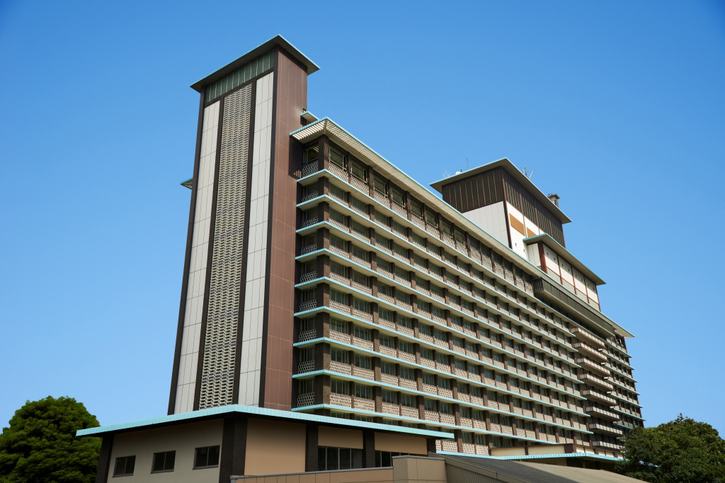 外観